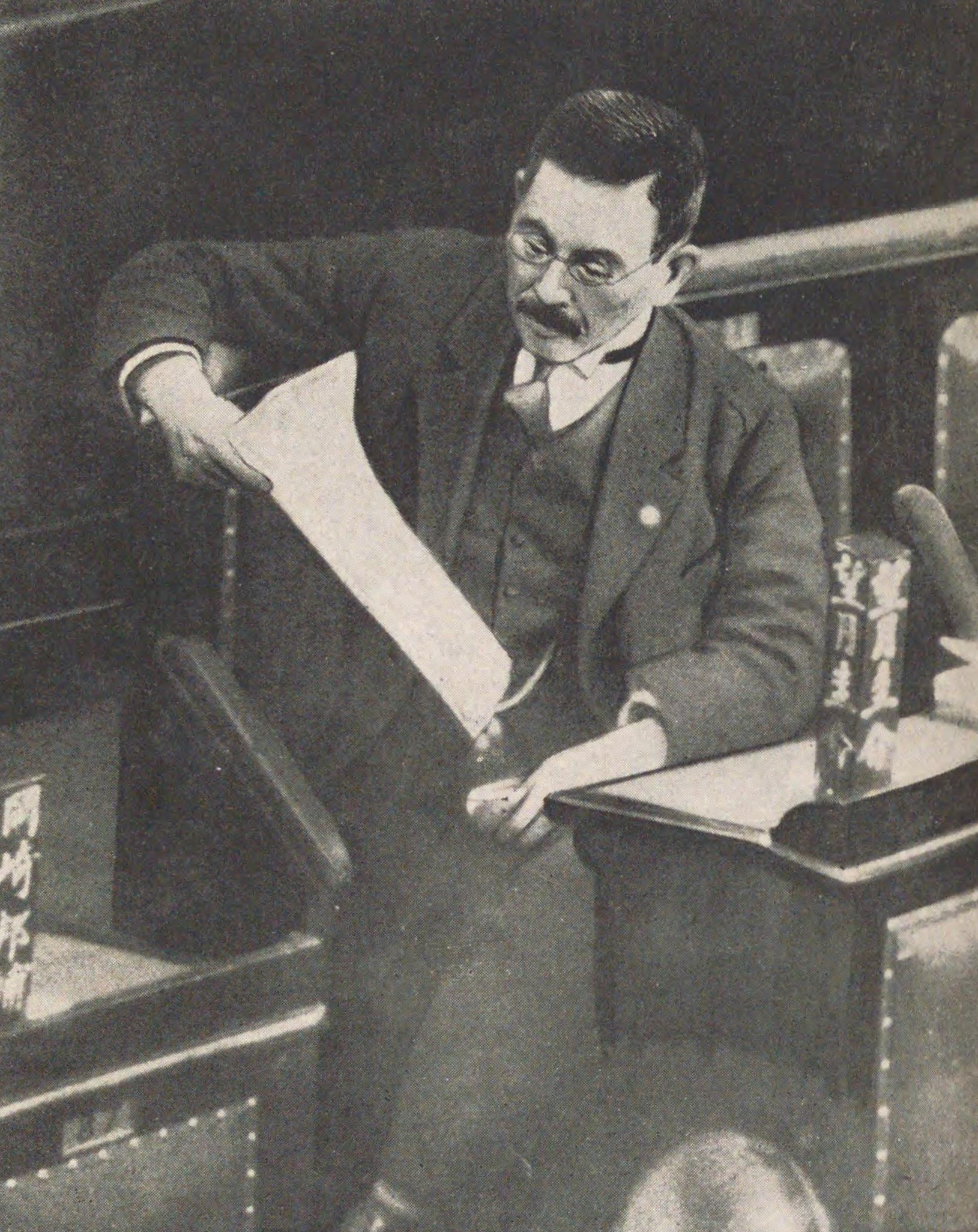 立憲政友会幹事長の望月圭介